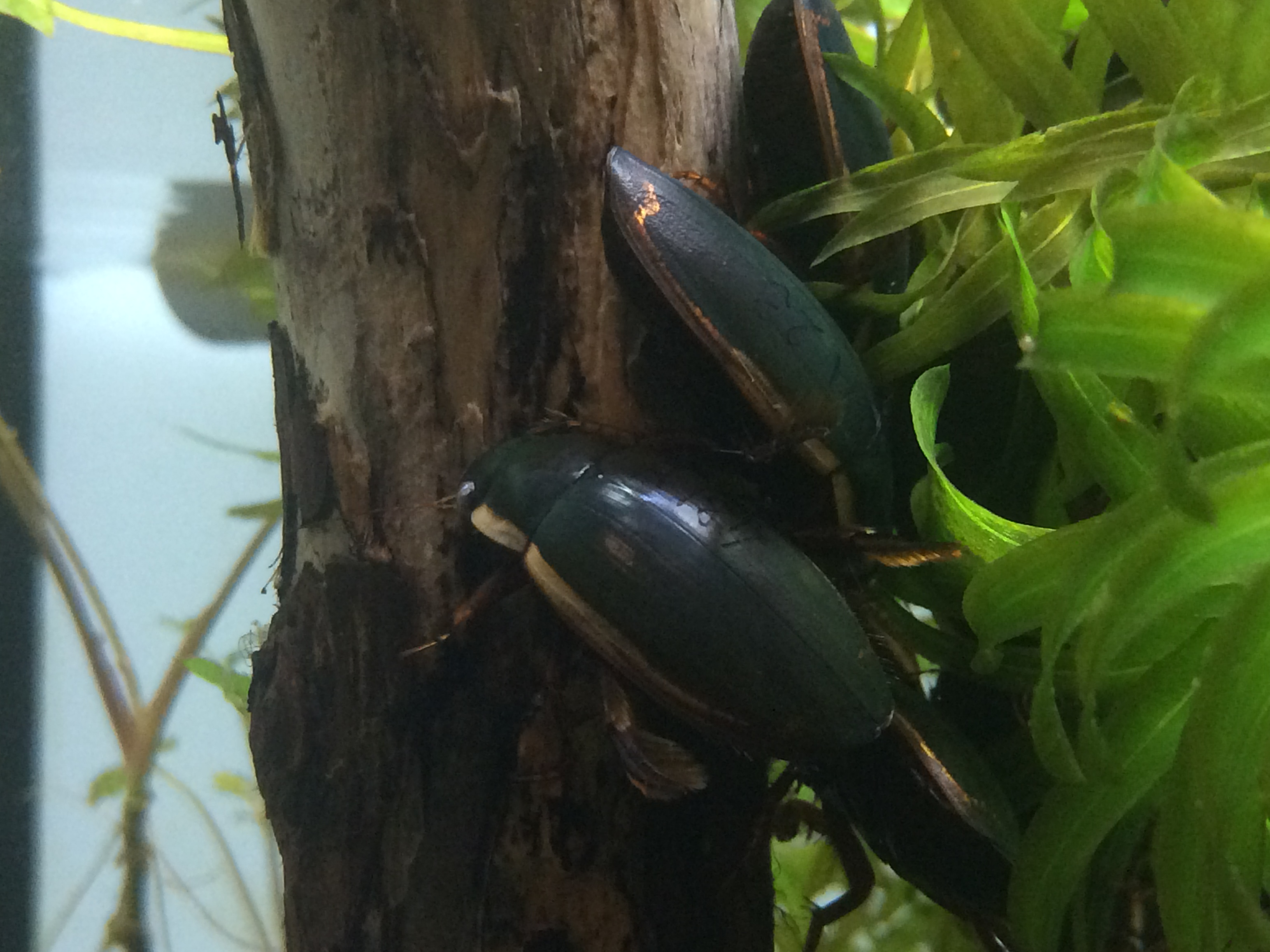 千葉県鴨川市の鴨川シーワールドにて飼育・繁殖活動が行われているシャープゲンゴロウモドキ。同園にて、iPhone 5Sで2017年7月24日撮影。